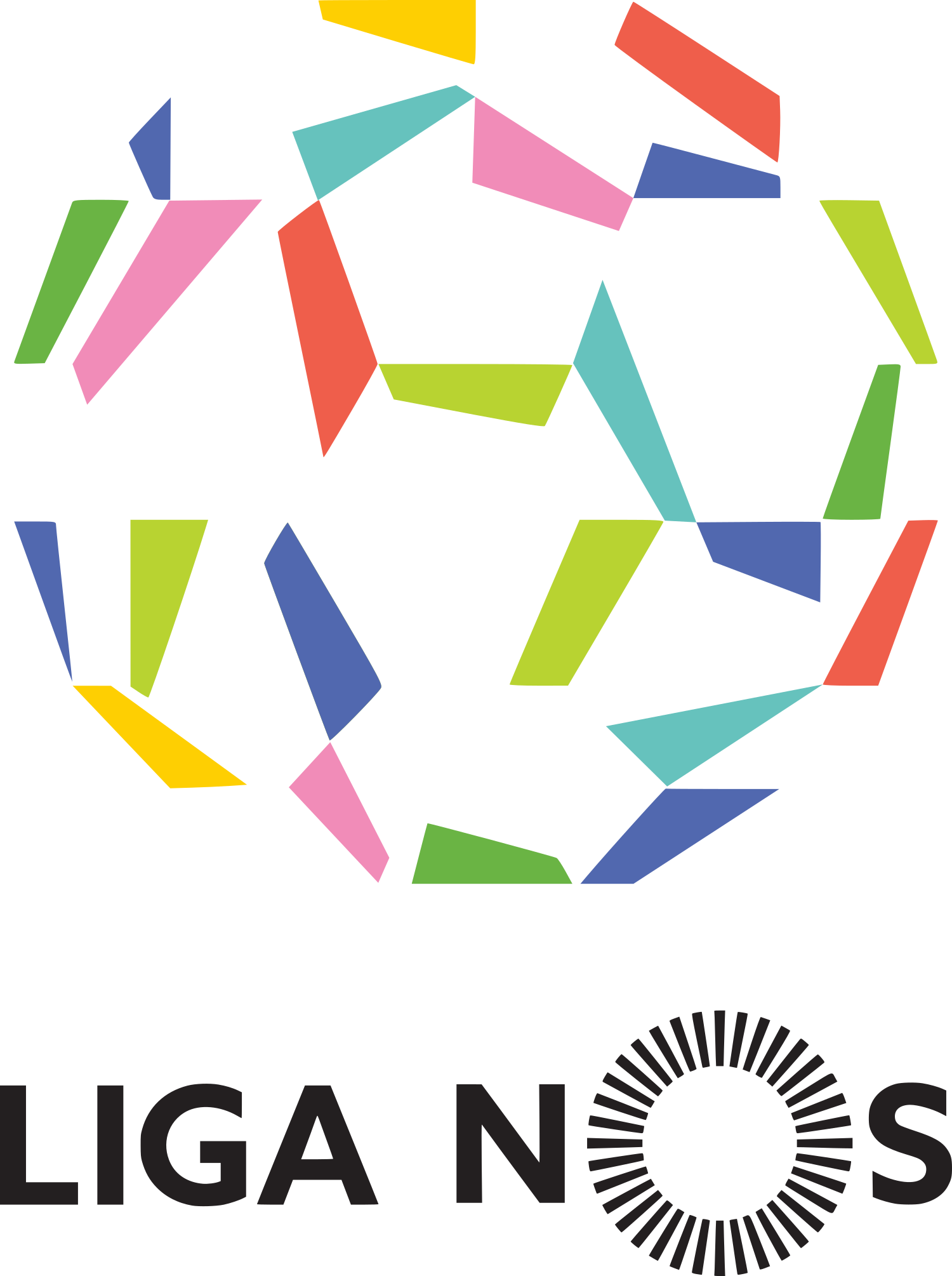 Logo der portugiesischen Primeira Liga